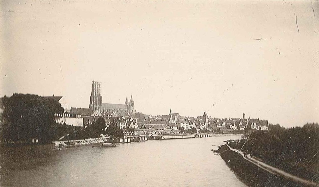 Ulm